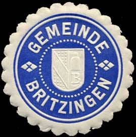 Sealing stamp Title: Gemeinde Britzingen Description: blau, weiß, geprägt Place: Britzingen size: 4 cm